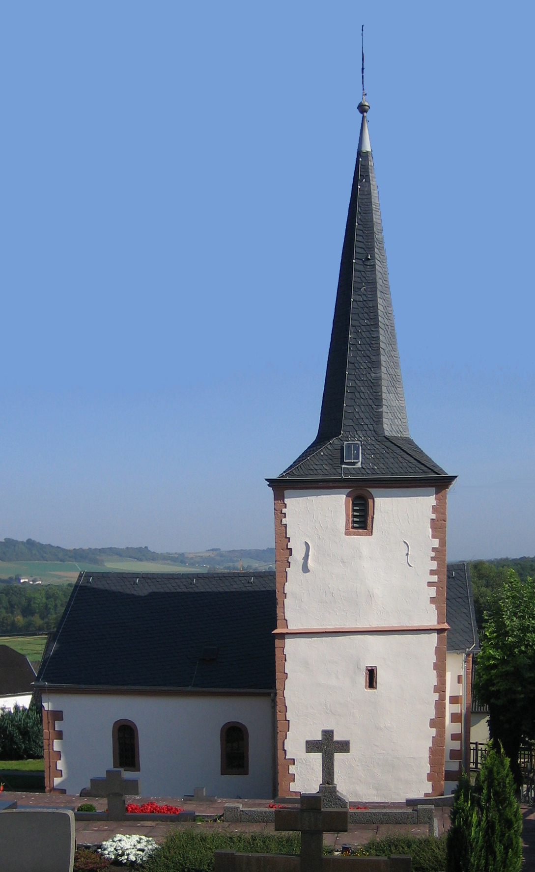 Kath. Kapelle St. Lukas und St. Arnold in Merzkirchen - Körrig